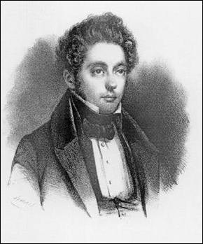 Charles Liedts, ministre belge